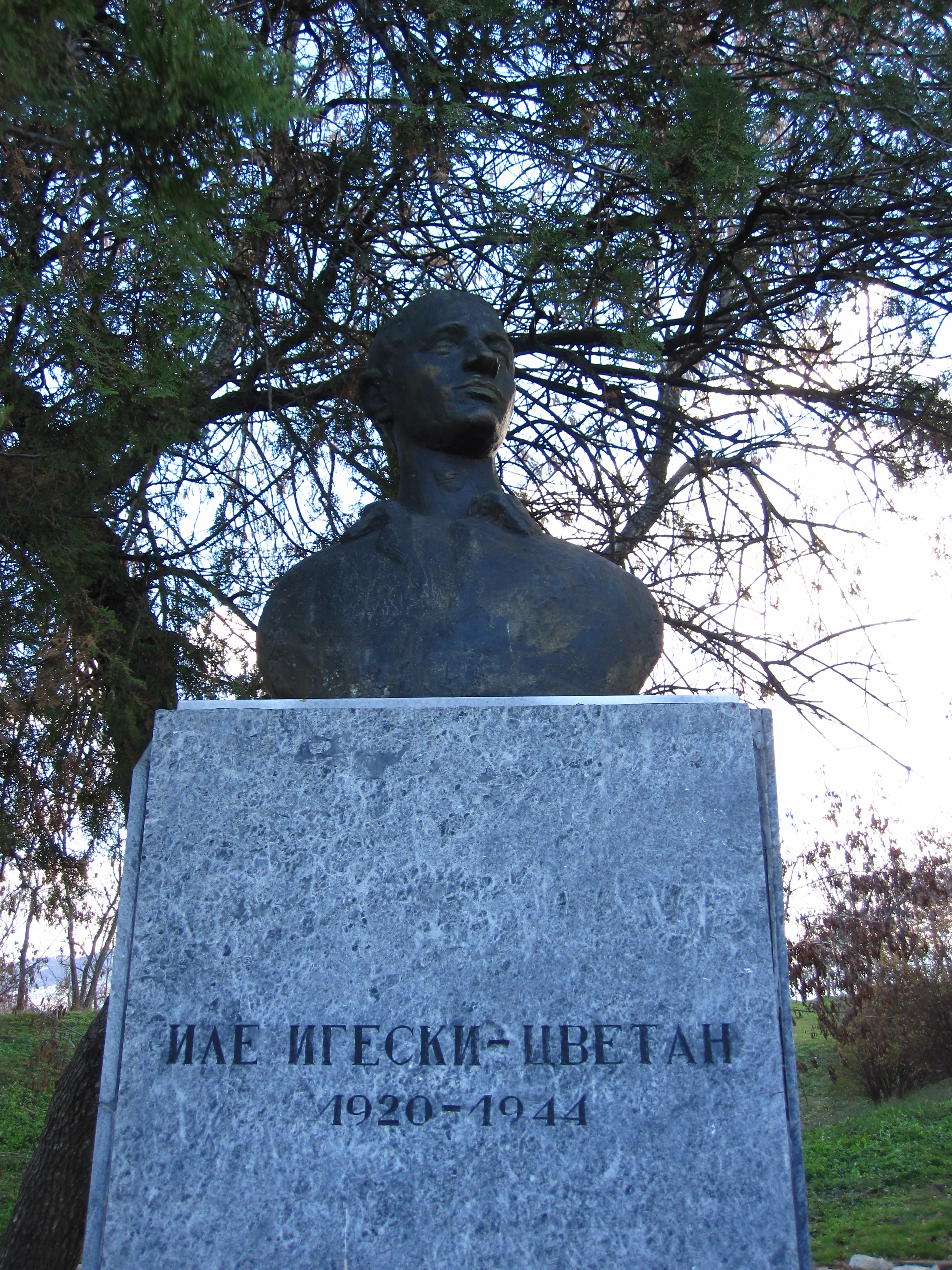 Биста - Иле Игески - Цветан - Прилеп (Се изинувам за ненамерната грешка во насловот, не можам да го сменам)